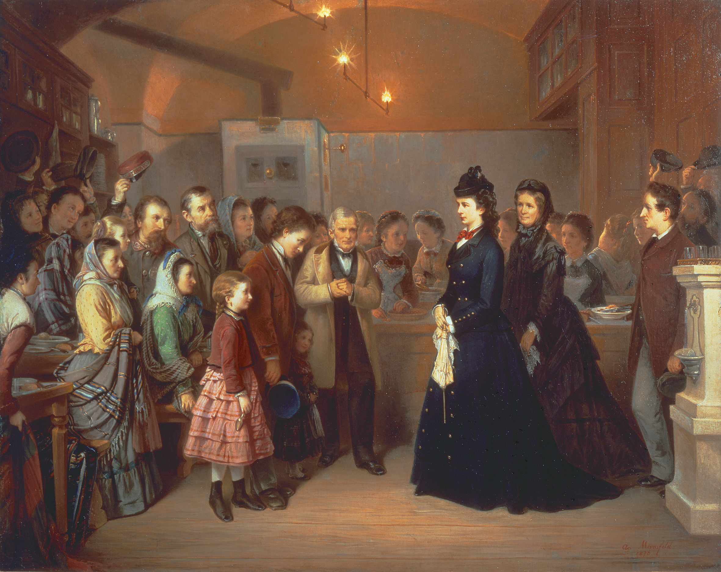 Besuch der Kaiserin Elisabeth in der Volksküche in der Schönlaterngasse